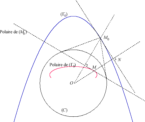 schéma de la polaire d'une courbe R Ferreol